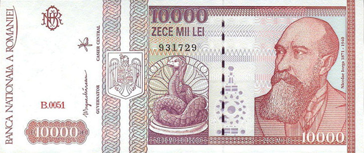 Billet de banque de 10.000 lei datant de 1994. A l'avers, portrait de l'historien roumain Nicolae Iorga et représentation du serpent Glykon.